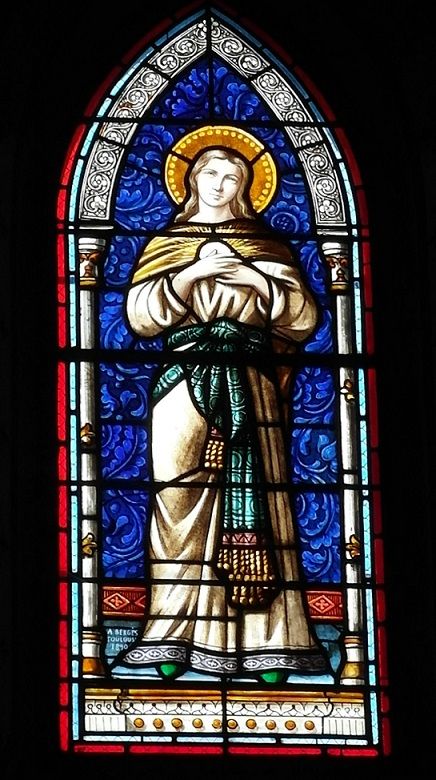 Laroque - Saint Tarsicius - Vitrail de la chapelle Saint-Jean.